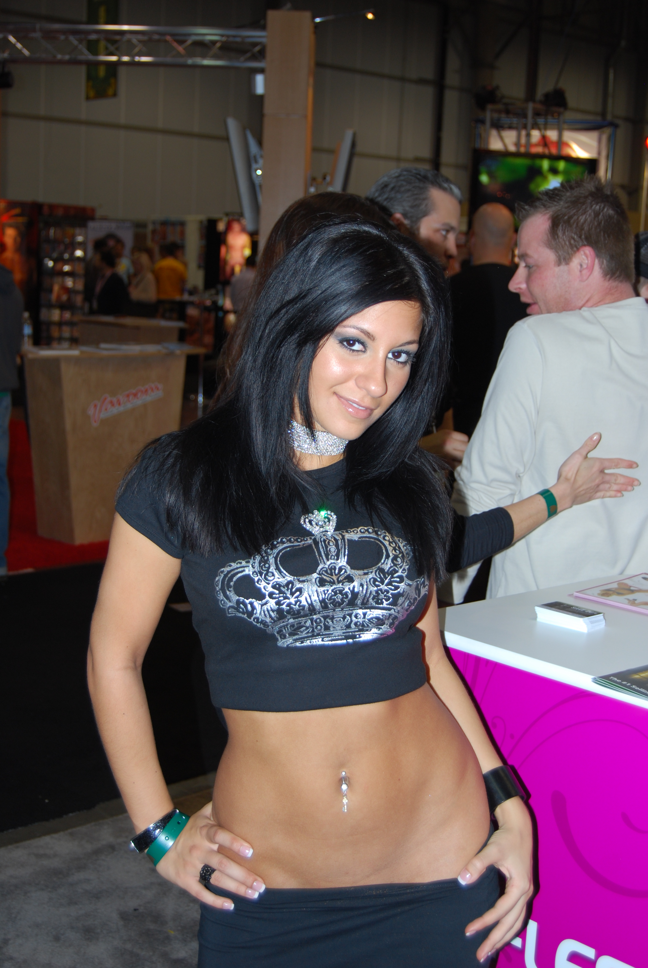 AEE2008_Nikon_Day1 407